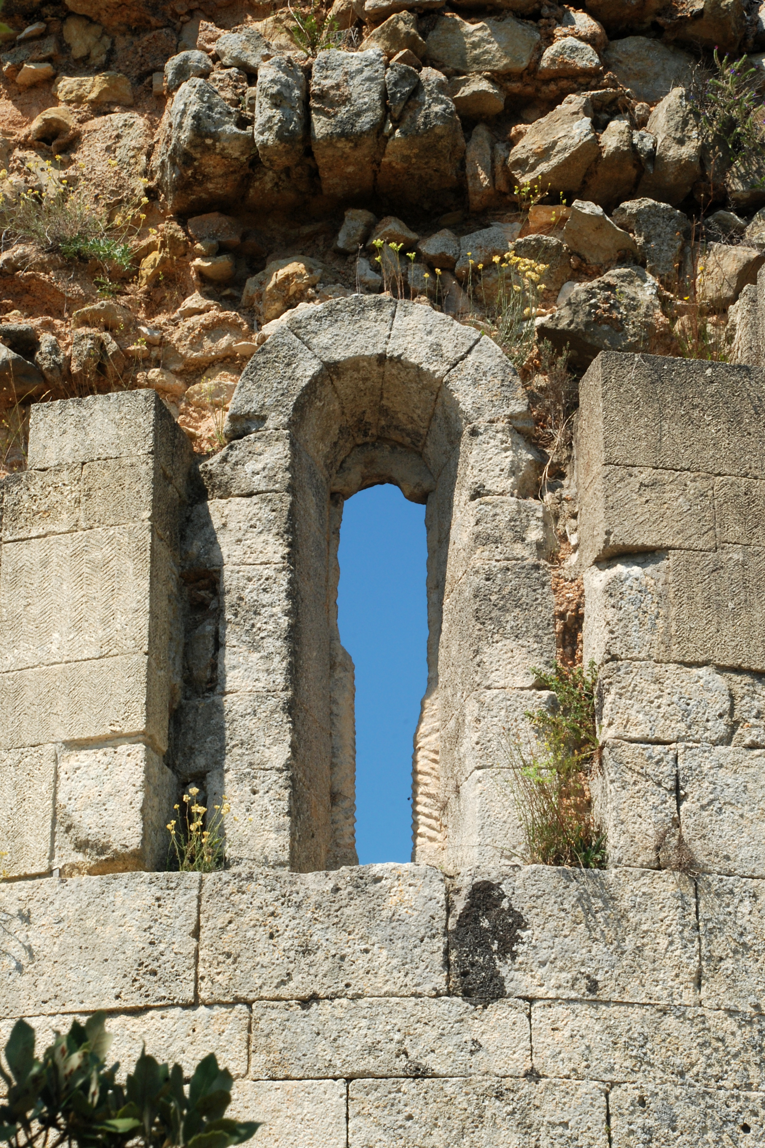 France - Gard - Église Saint-André de Souvignargues